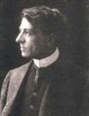 фотография итальянского композитора и пианиста Ренато Броджи (1873-1924)